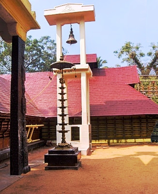 ശ്രീകണ്ഠേശ്വരക്ഷേത്രം